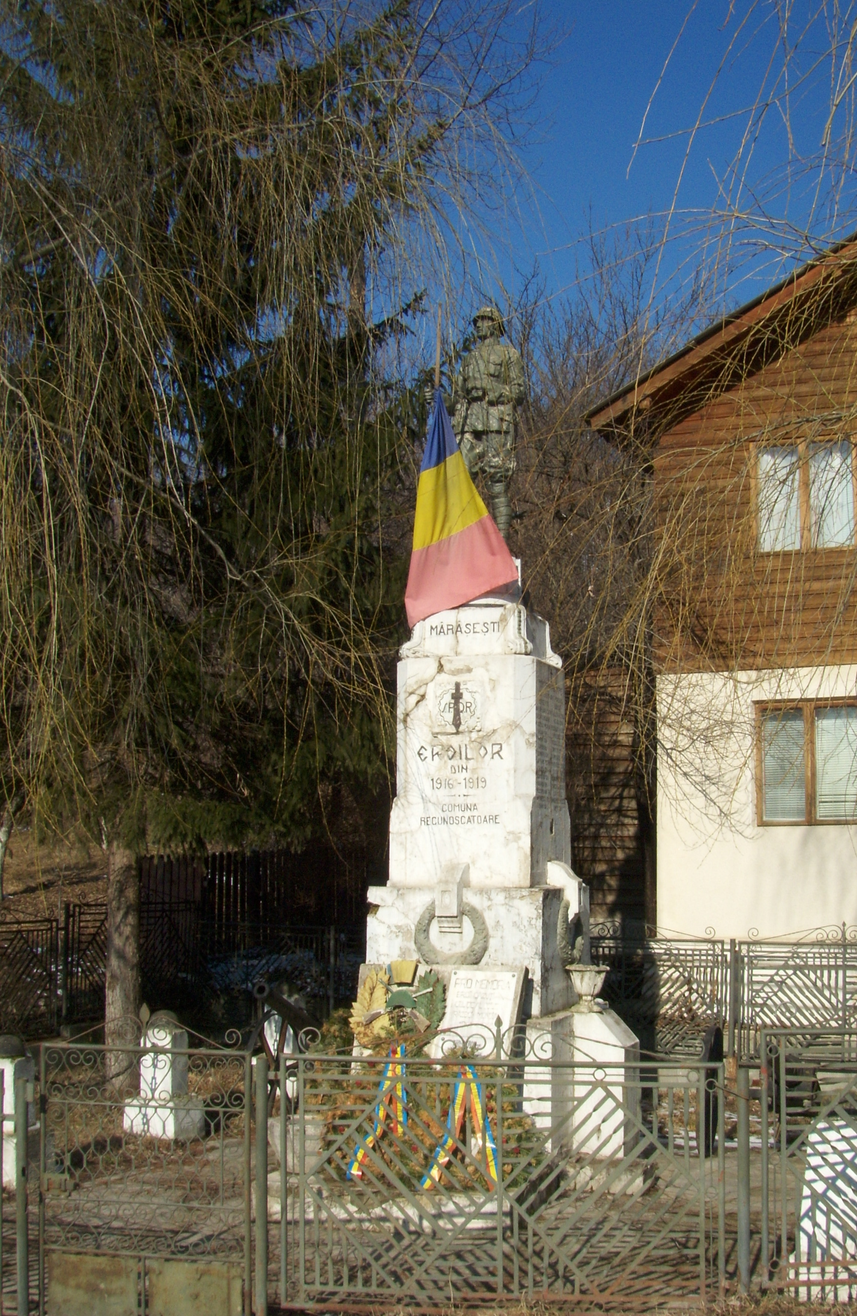 Monumentul eroilor căzuți în Primul Război Mondial